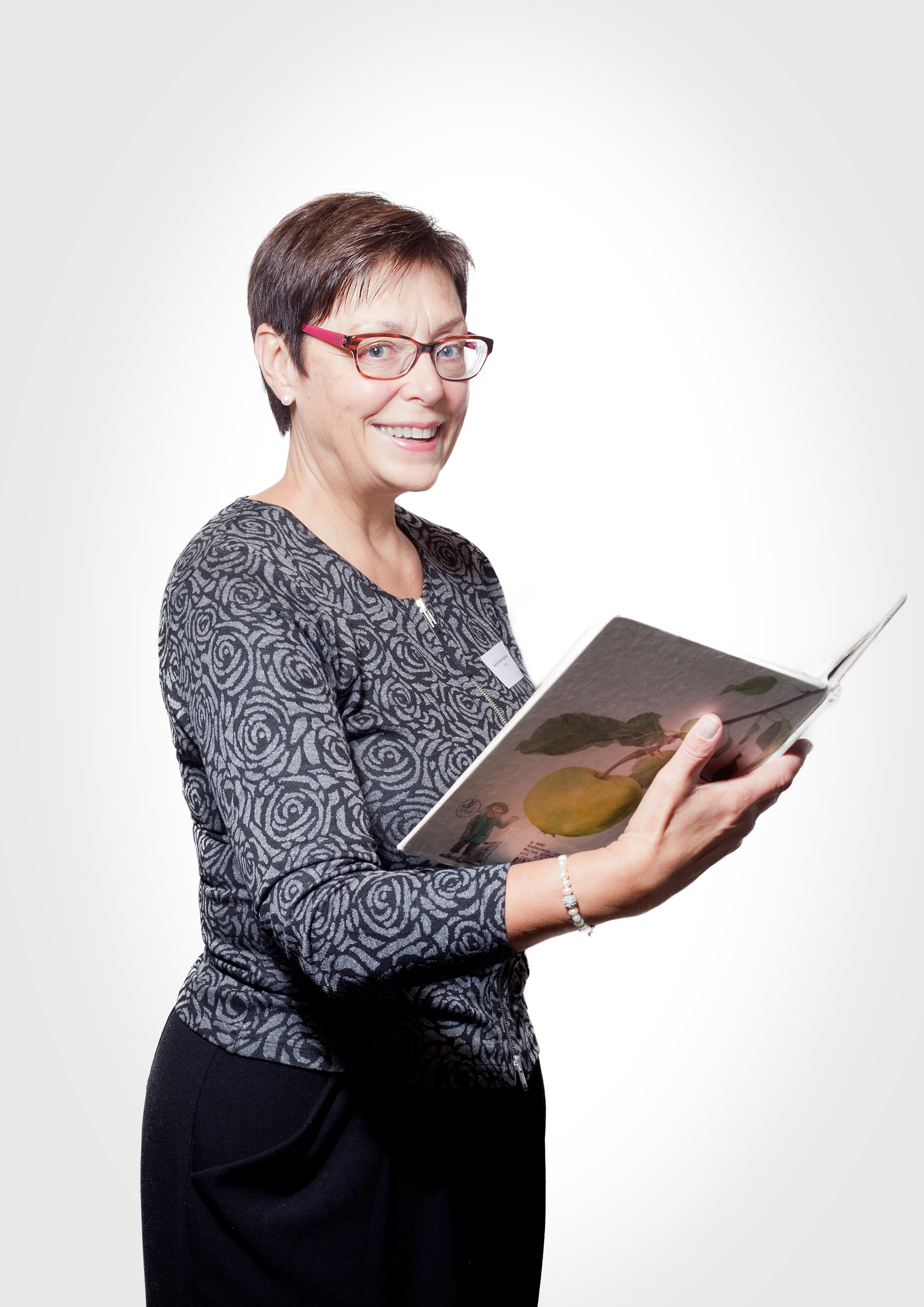 Assisterende fylkesmann, tidligere ordfører og stortingsrepresentant Gerd Janne Kristoffersen fra Verdal, Nord-Trøndelag. Bildet er tatt i forbindelse med Nord-Trøndelag fylkesbiblioteks kampanje "Leseambassadører"